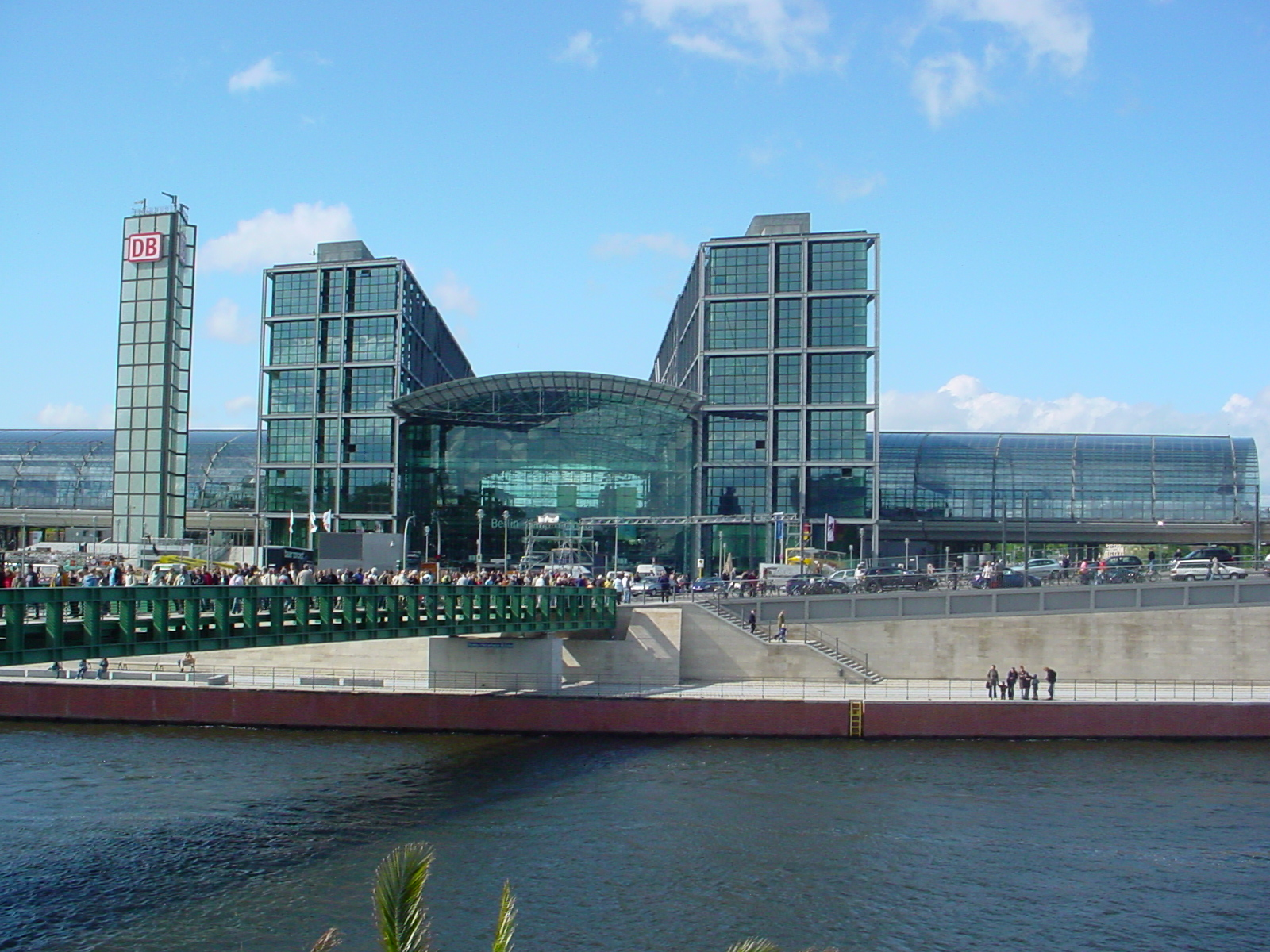 Berlin Hauptbahnhof